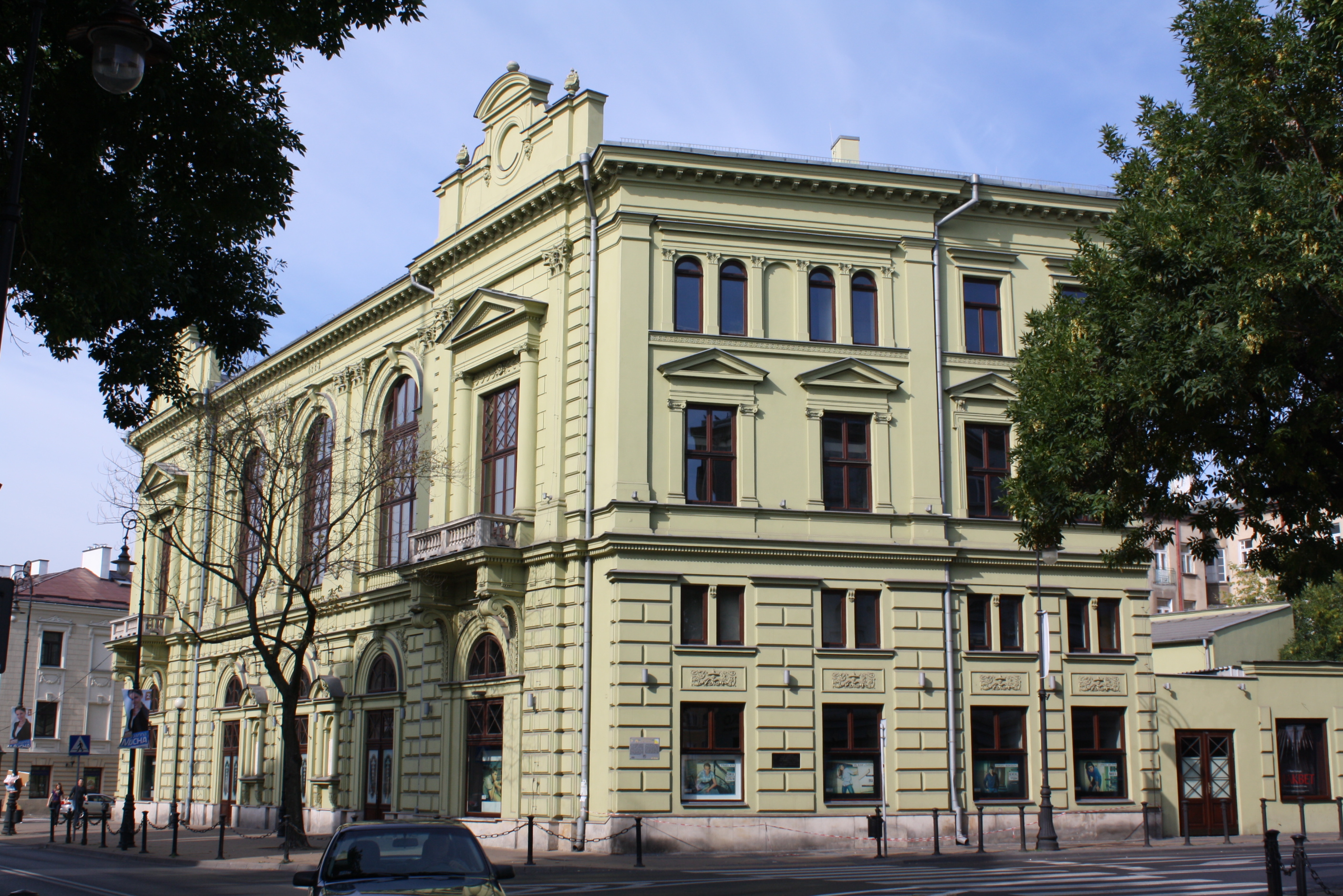 Lublin - Teatr im. J. Osterwy ul. Narutowicza 17